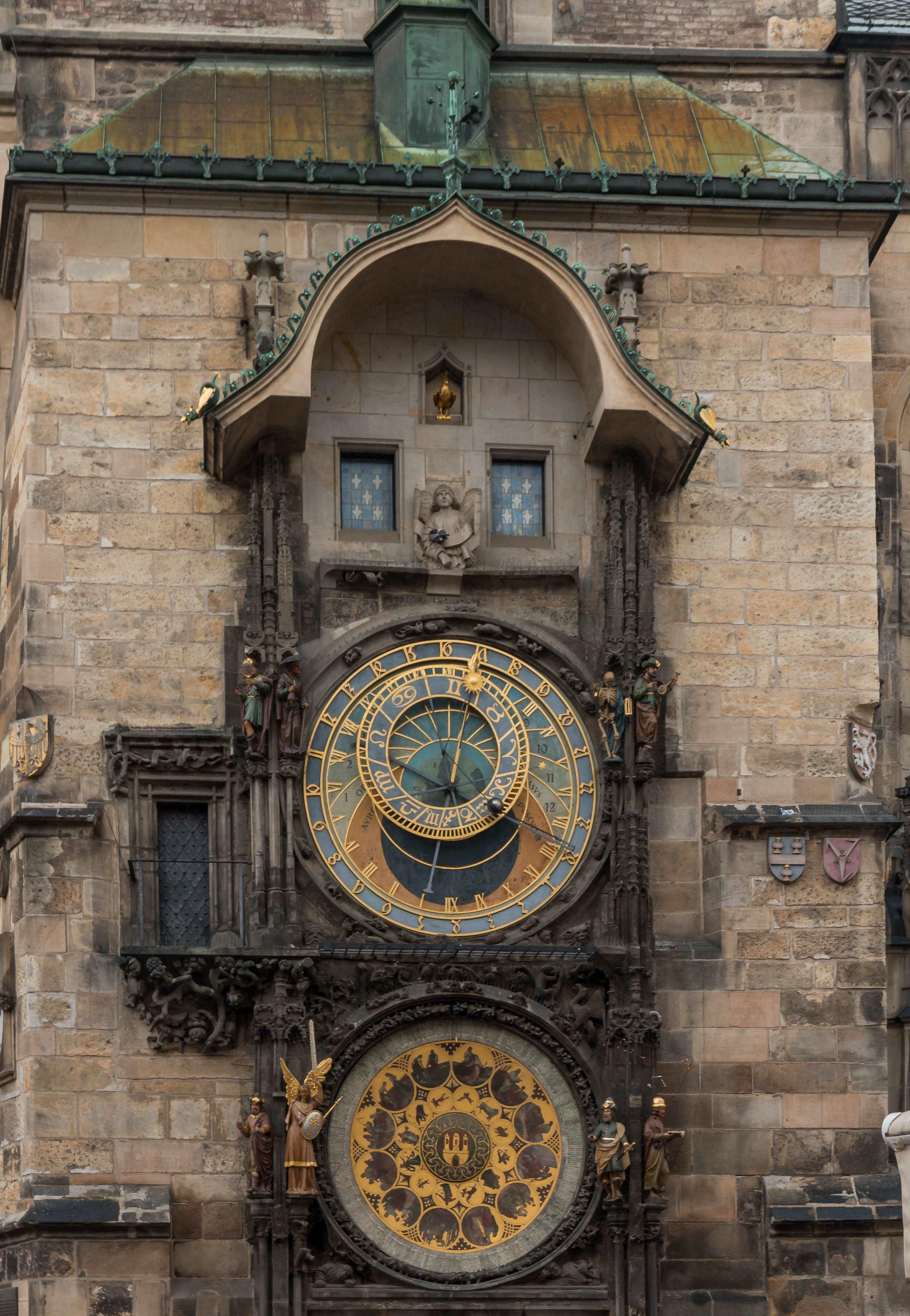 Prager Rathausuhr